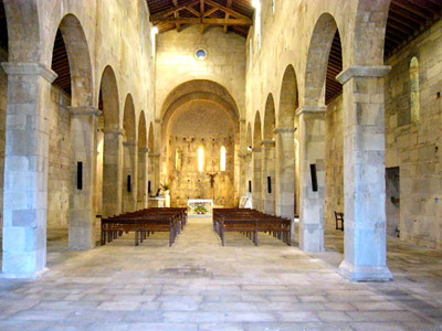 interieur de la basilique